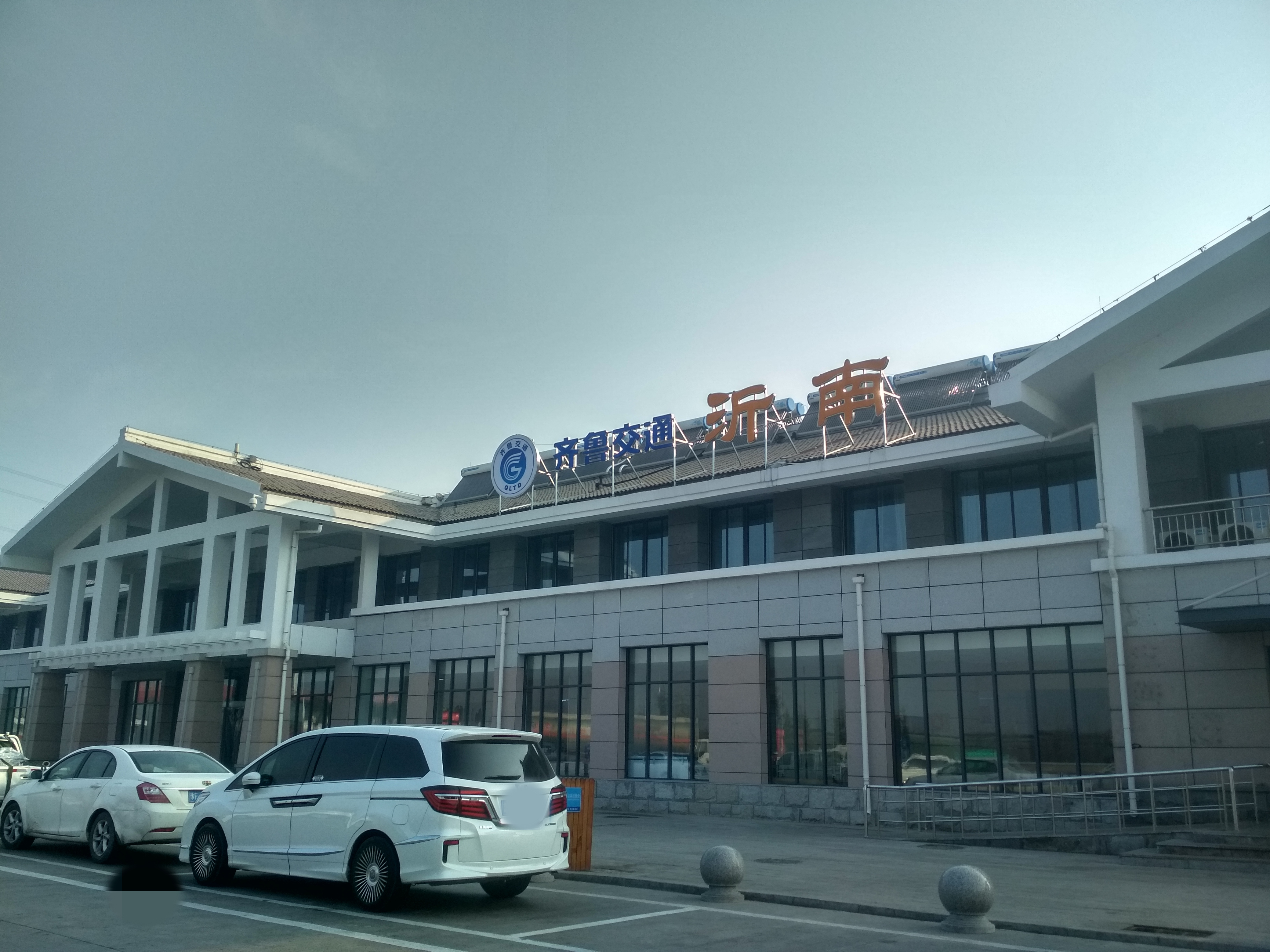 中文（中国大陆）: 中国长深高速沂南服务区